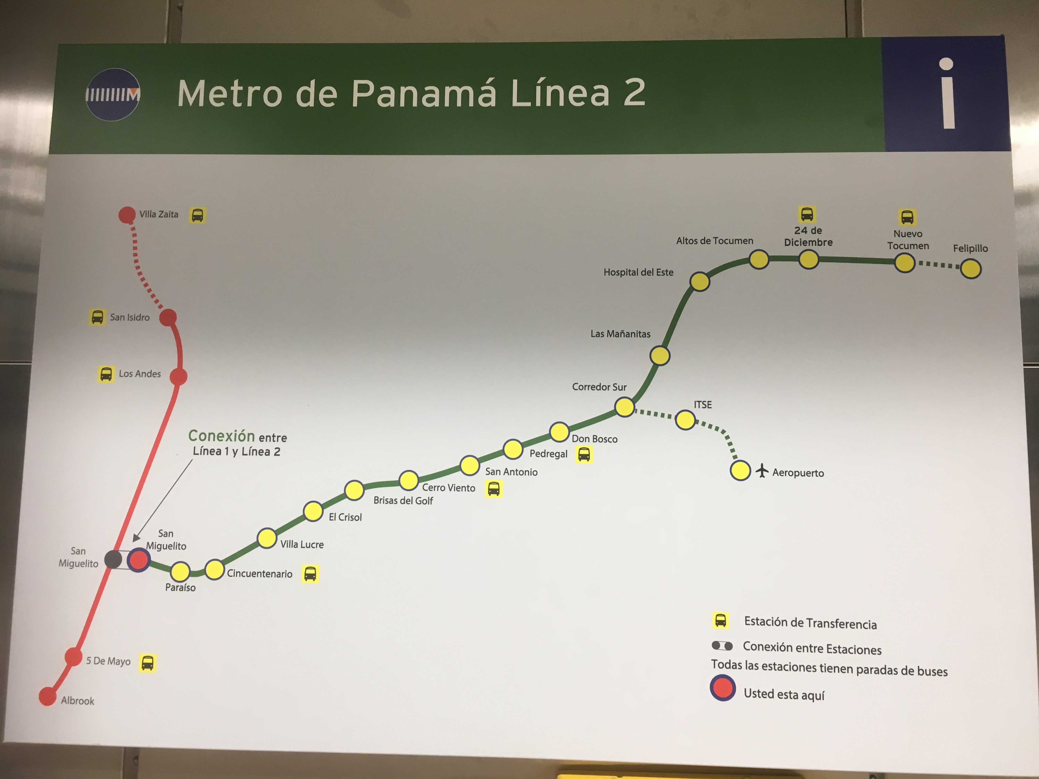 Plan der zukünftigen Metrolinie 2 in Panama